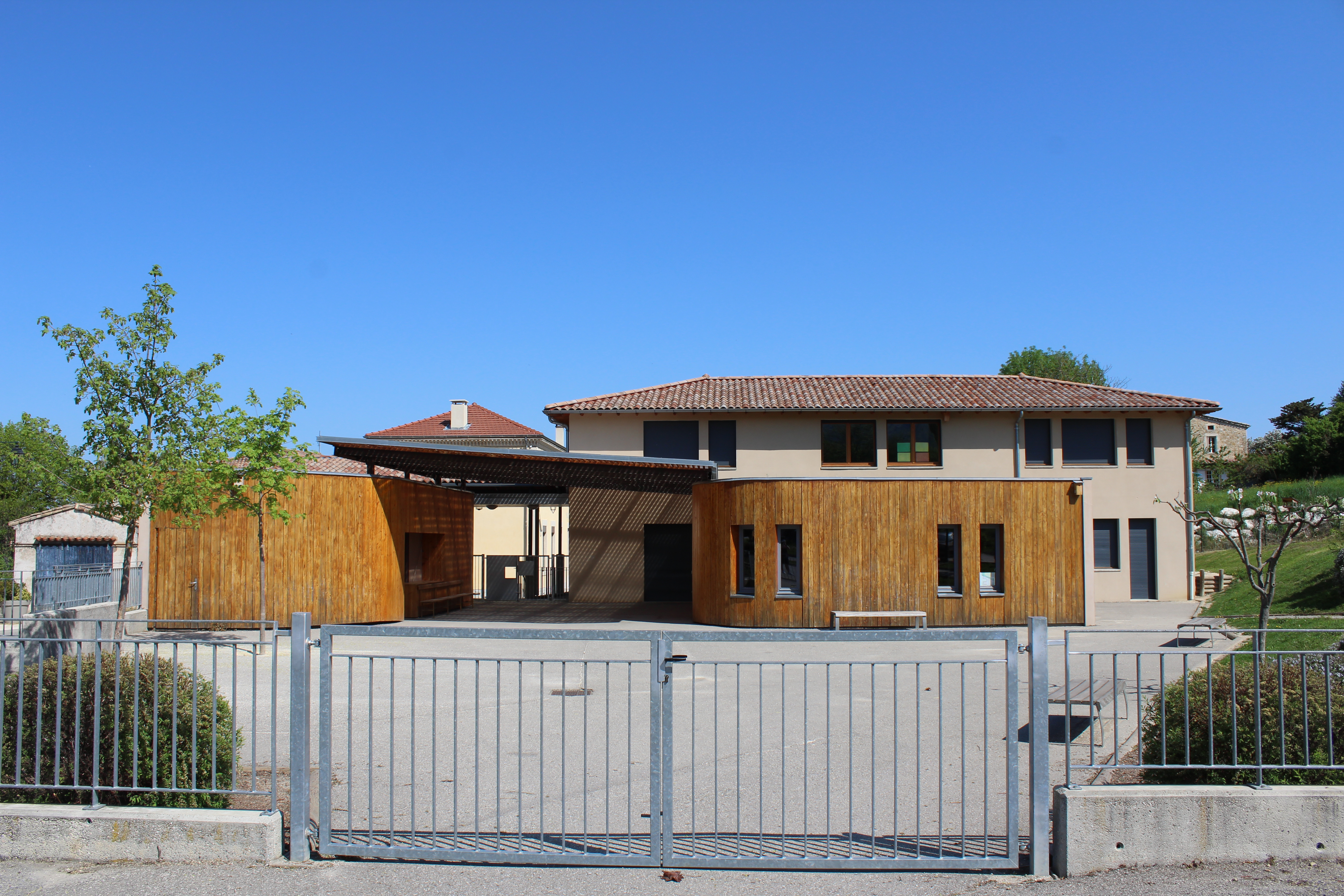 Photographie de l'école de Piégros-la-Clastre